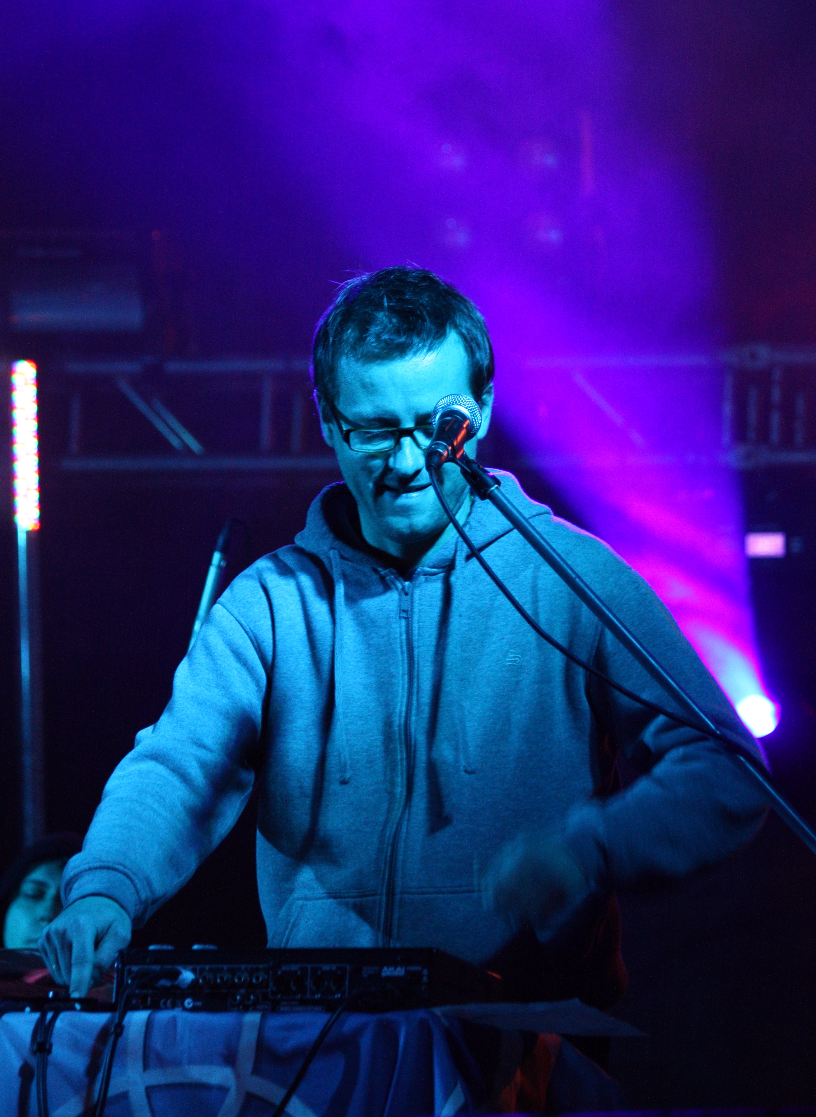 Koncert Lao Che w Wesołej, 18 września 2010.